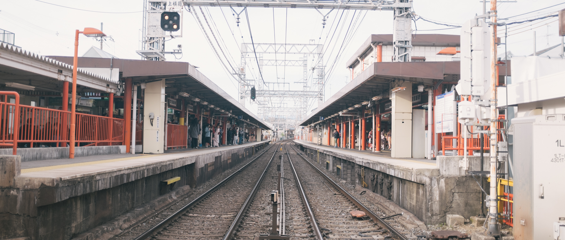 Kyoto in Japan